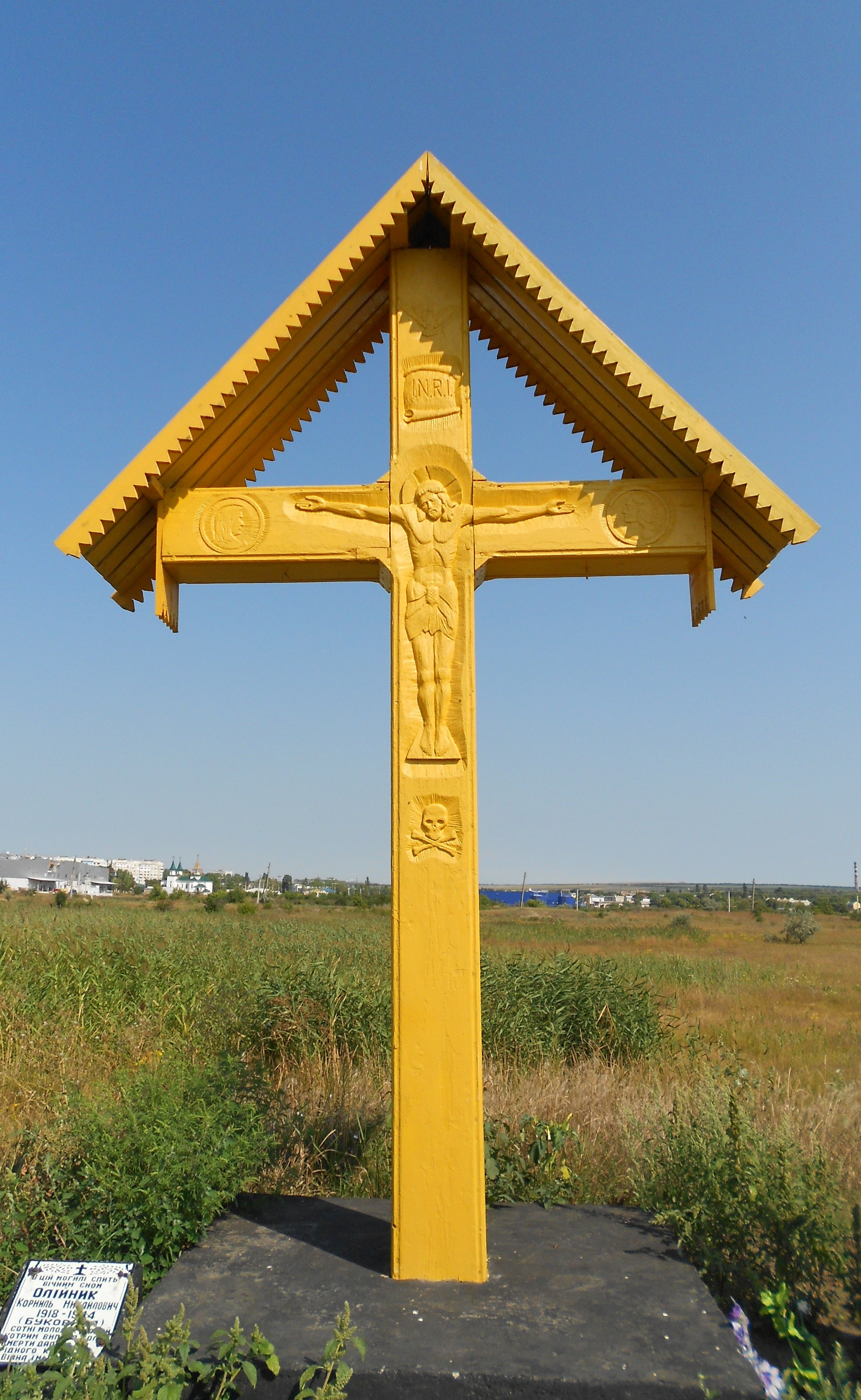 Troița instalată în 1992 în valea râului Răt, pe locul unde au fost găsite osemintele prizonierilor lagărului de concentrare din Bălți existent în anii postbelici